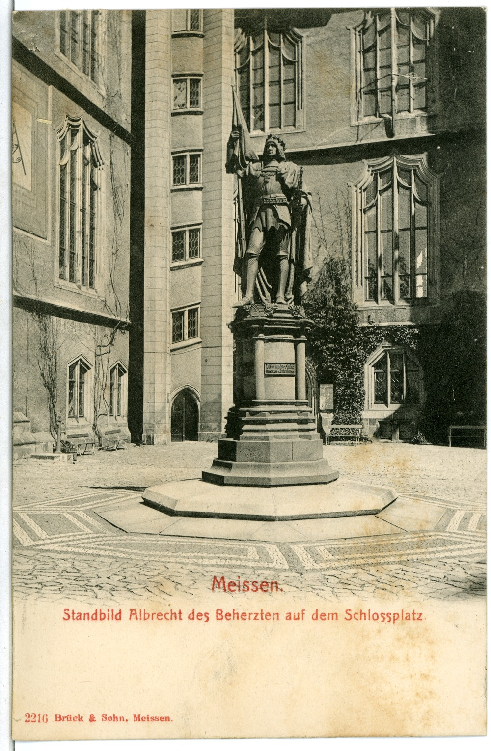 Meißen; Standbild Albrecht der Beherzten This postcard is from publisher Brück & Sohn in Meißen ( postcard has a unique number 02216 and is available in a higher resolution at the publisher. This images was uploaded in a cooperation project between Wikipedians and the publisher.